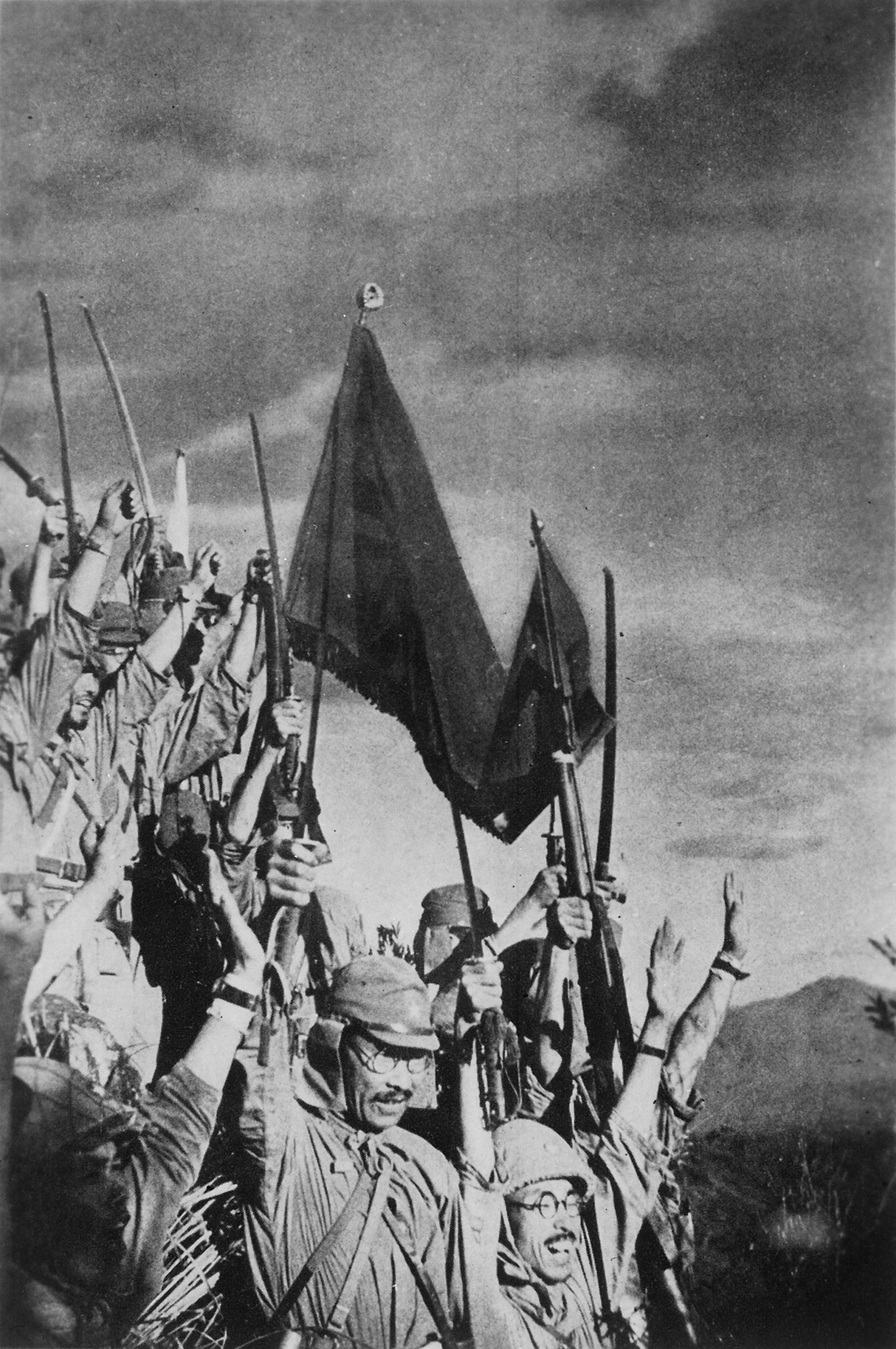 Japanese troops on Bataan, Philippine Islands.